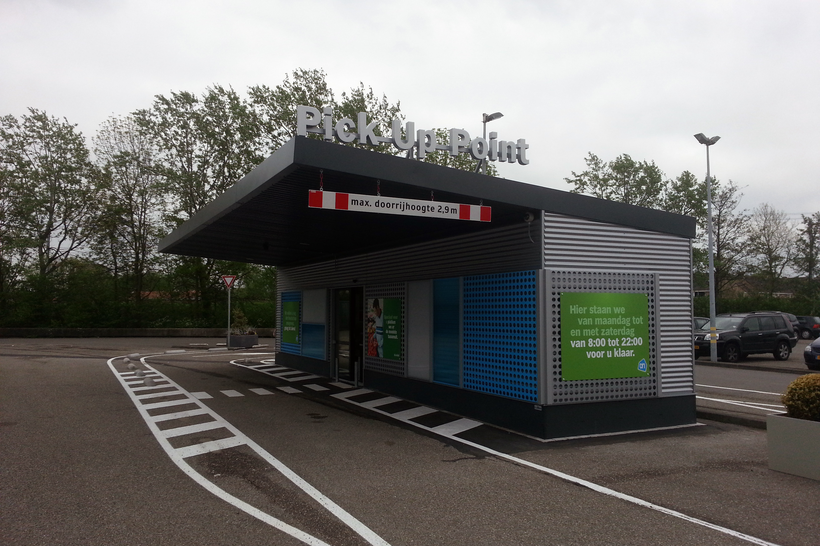 Pick Up Point (PUP) van de Albert Heijn XL aan de Burgemeester Kooimanweg in Purmerend.